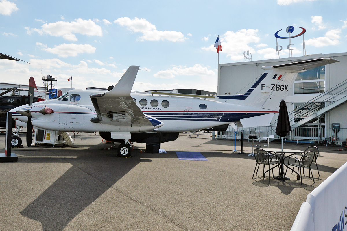 Douane Francaise, F-ZBGK, Beech 300 Super King Air 350